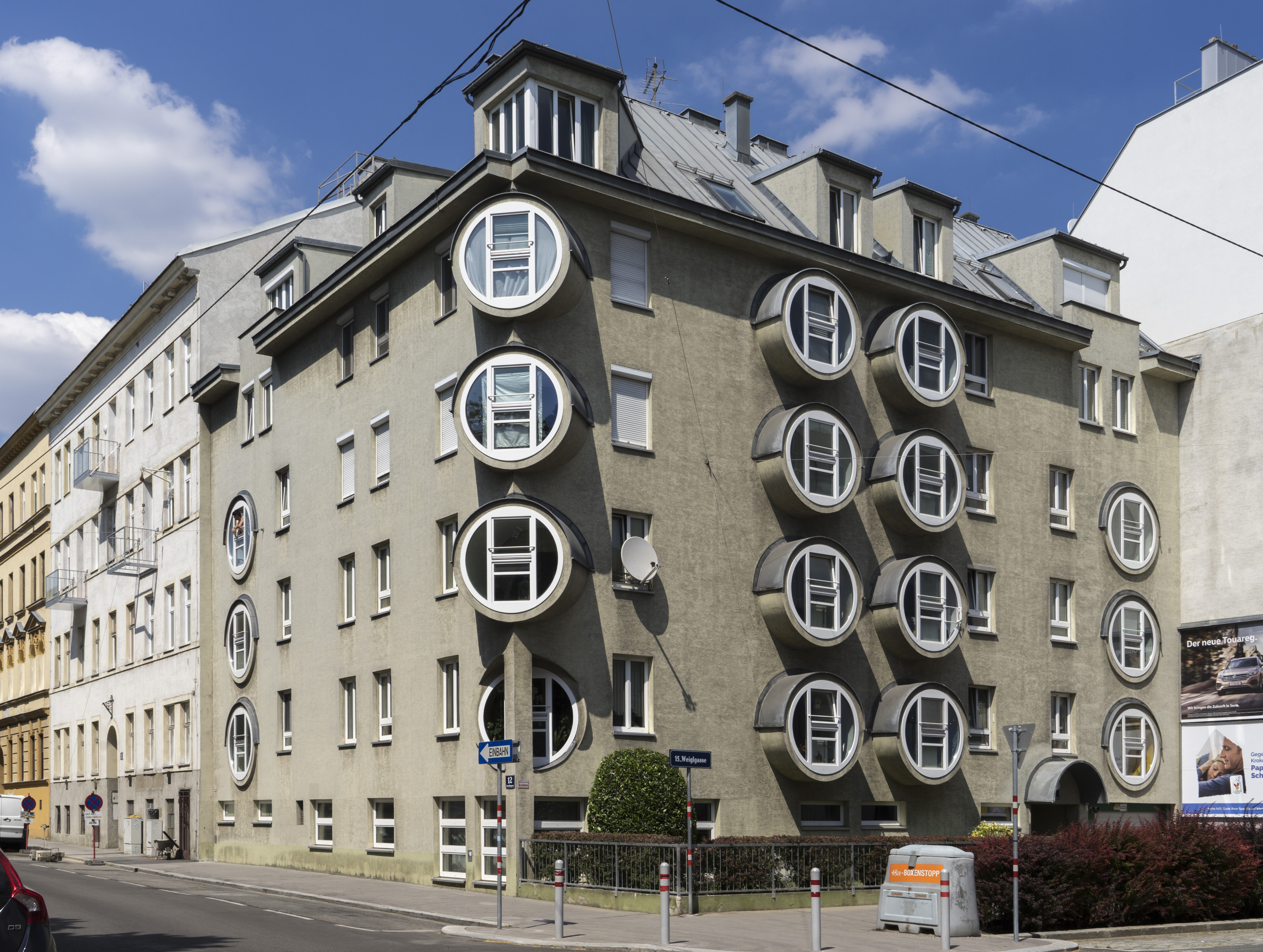 Wohnhausanlage Weiglgasse 4